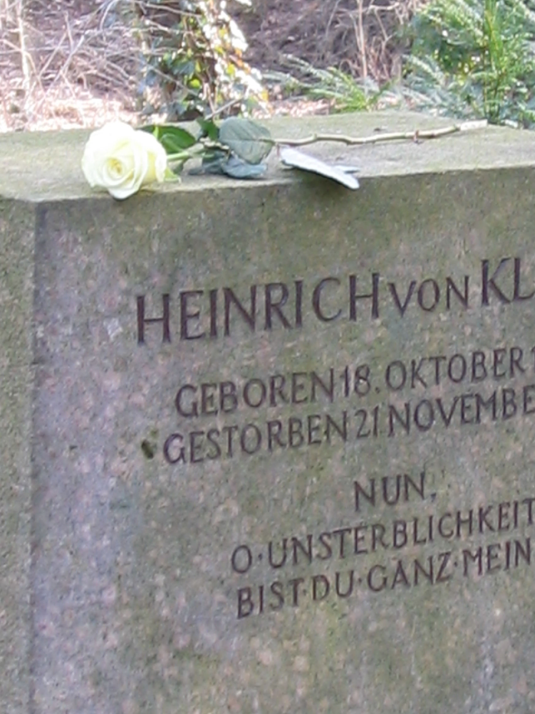 Heinrich von Kleists Grabstein, Berlin-Wannsee; Grabaufschrift: Heinrich von Kleist, Geboren 18. Oktober 1777 Gestorben 21. November 1811, "Nun, O Unsterblichkeit, bist du ganz mein" (Zitat aus "Prinz Friedrich von Homburg") --- Grave of Heinrich von Kleist, Berlin-Wannsee